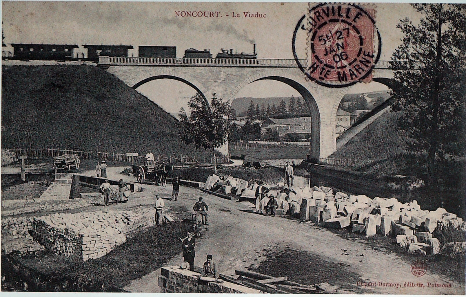 sur une vue ancienne.